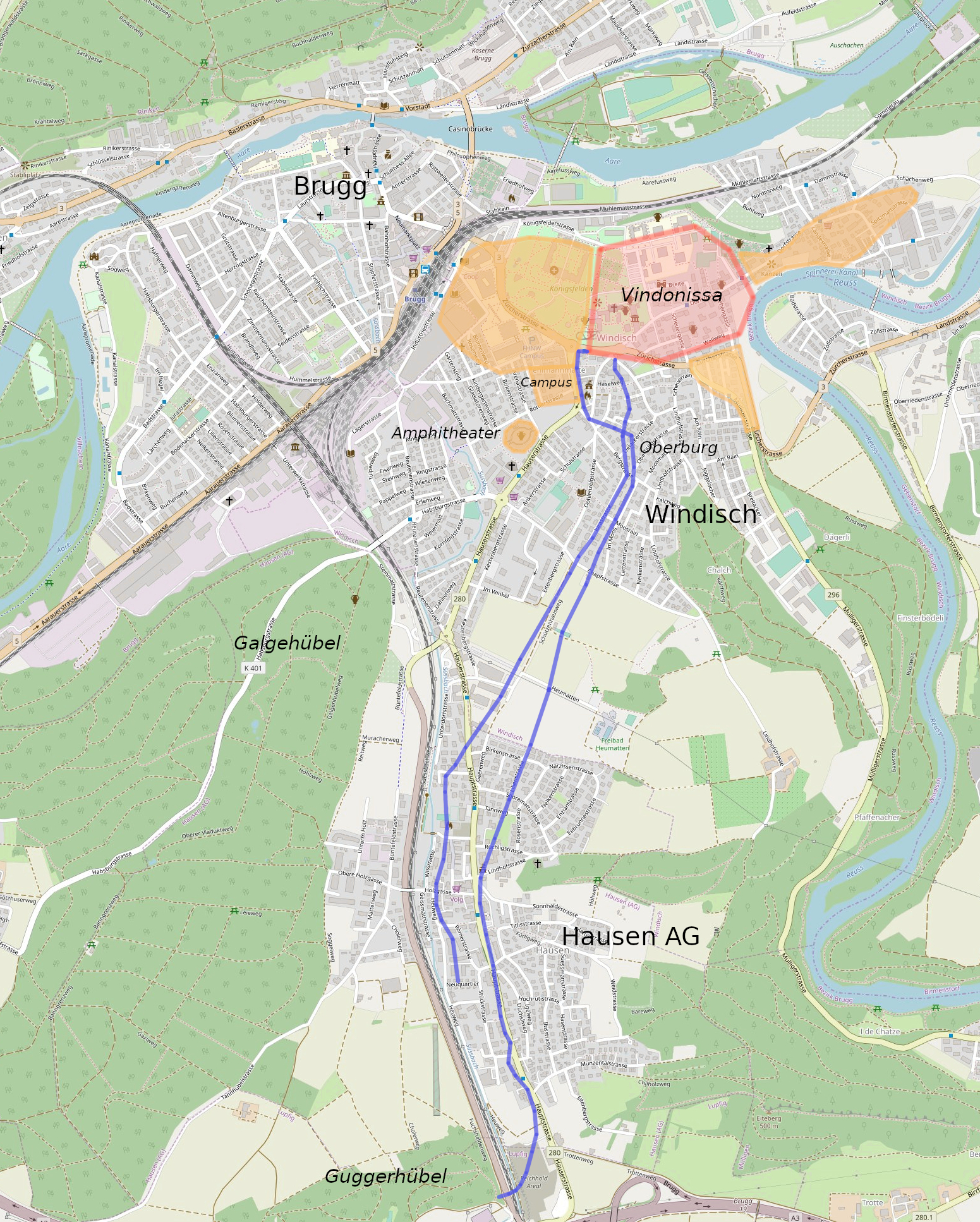 Karte von Brugg, Windisch und Hausen im Schweizerischen Kanton Aargau rot: Lage des ehem. Legionslagers Vindonissa orange: Zivilsiedlungen und Grossbauten blau: Wasserleitungen (tote römische Wasserleitung von Vindonissa und wasserführende römische / mittelalterliche Wasserleitung von Vindonissa) Das Legionslager Vindonissa war insbesondere von 14 - 101 n. Chr. besetzt, nacheinander von drei Legionen, der 13., 21. und 11. Legion. Zu den Wasserleitungen: Bis Oberburg verläuft westliche die ca. 2,4 km lange, wasserführende Wasserleitung, die noch heute einen Springbrungen vor der Klinik Königsfelden speist. Sie ist somit vermutlich das älteste technische Bauwerk der Schweiz, das immer noch seinen Zweck erfüllt. Bis Oberburg verläuft östlich davon die zweite, tote (nicht mehr intakte) römische Wasserleitung, die bei archäologischen Untersuchungen in den Jahren 1928 bis 1931 als eigenständige Leitung identifiziert wurde. Sie stellte mit mindestens 3,3 km Länge ursprünglich das grössere Bauwerk dar. Auf dem letzten Abschnitt im Bereich des heutigen Dorfzentrums von Windisch wurde diese Leitung oberirdisch als Aquaeduktbrücke weitergeführt. Quellen: Die Grundkarte wurde openstreetmap entnommen, Lage des Legionslagers und Verlauf der Wasserleitungen orientieren sich an Trumm, Jürgen, Ausgrabungen in Vindonissa im Jahr 2016, In: Jahrbuch Gesellschaft Pro Vindonissa 2016, S. 123, Abb. 31